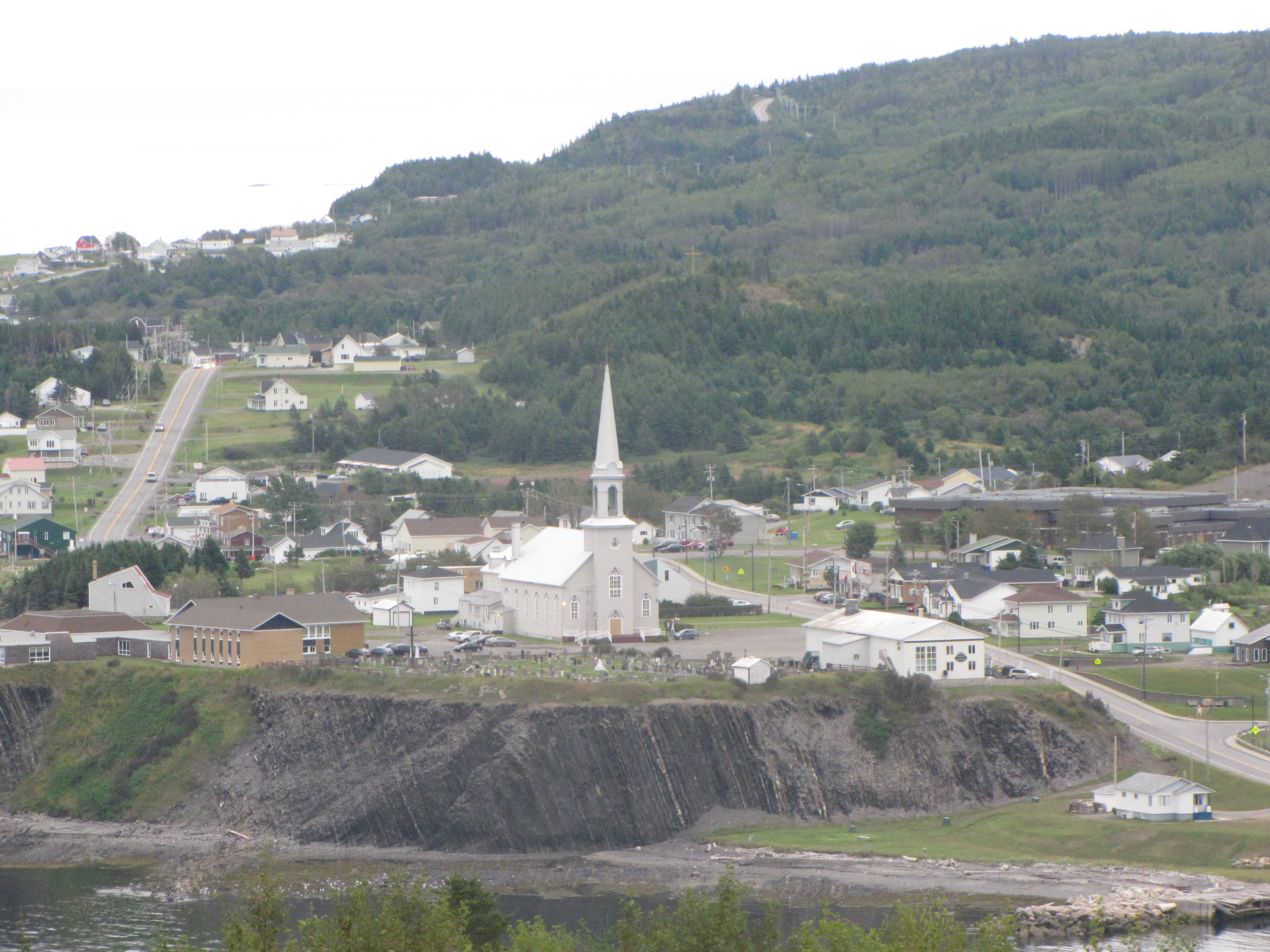 Grande-Vallée, avec son église sur un promontoir rocheux, Qc, Canada